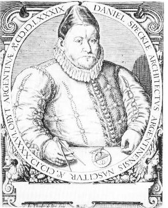 Daniel Specke (Specklin)